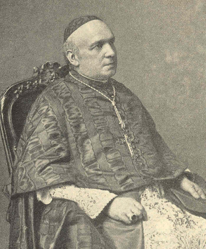 Domenico Ferrata cardinal italien, secrétaire d'état